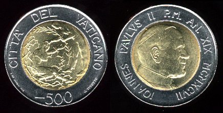 scan image